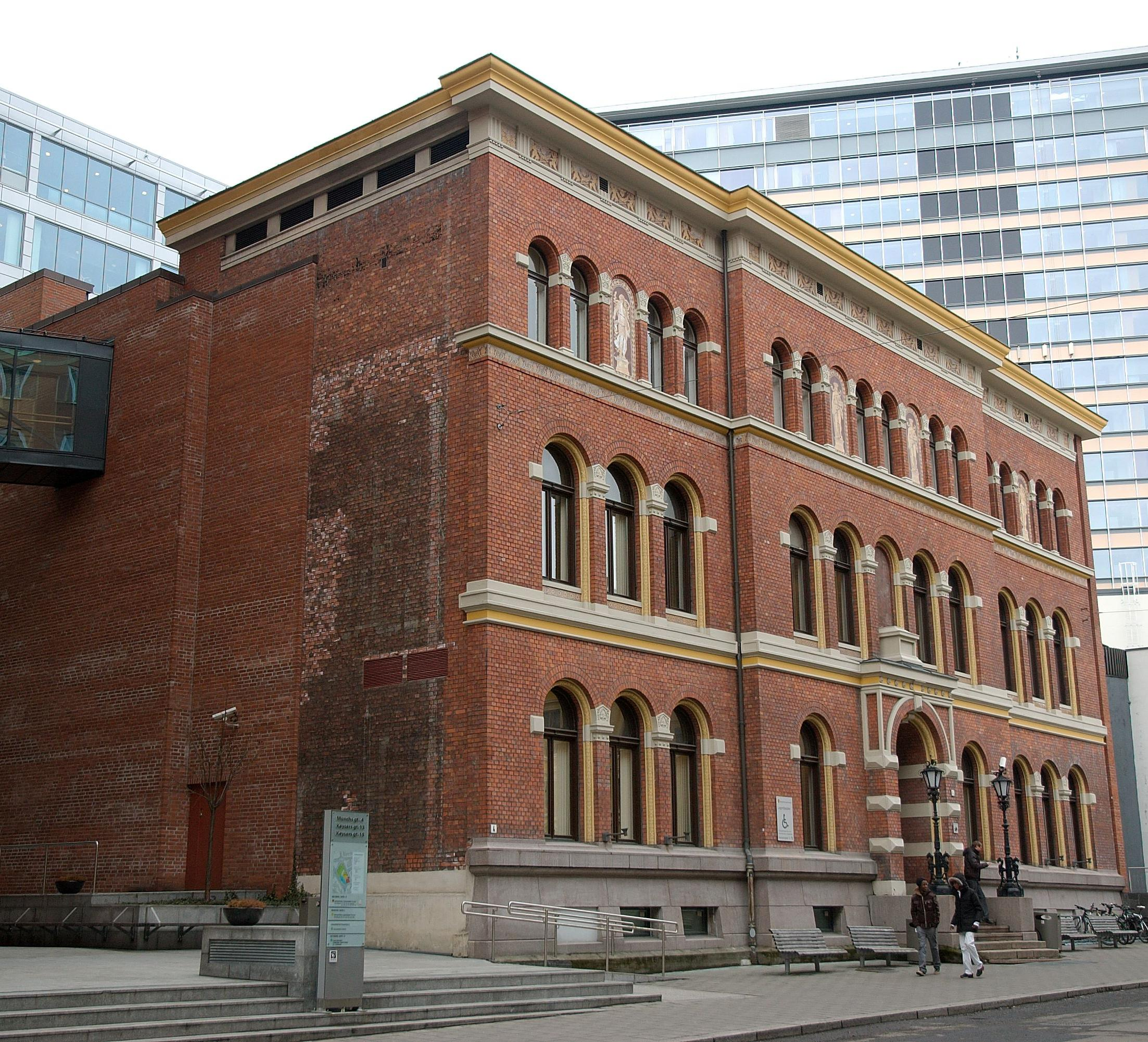 Borgarting Lagmannsrett i Munchs gate i Oslo.